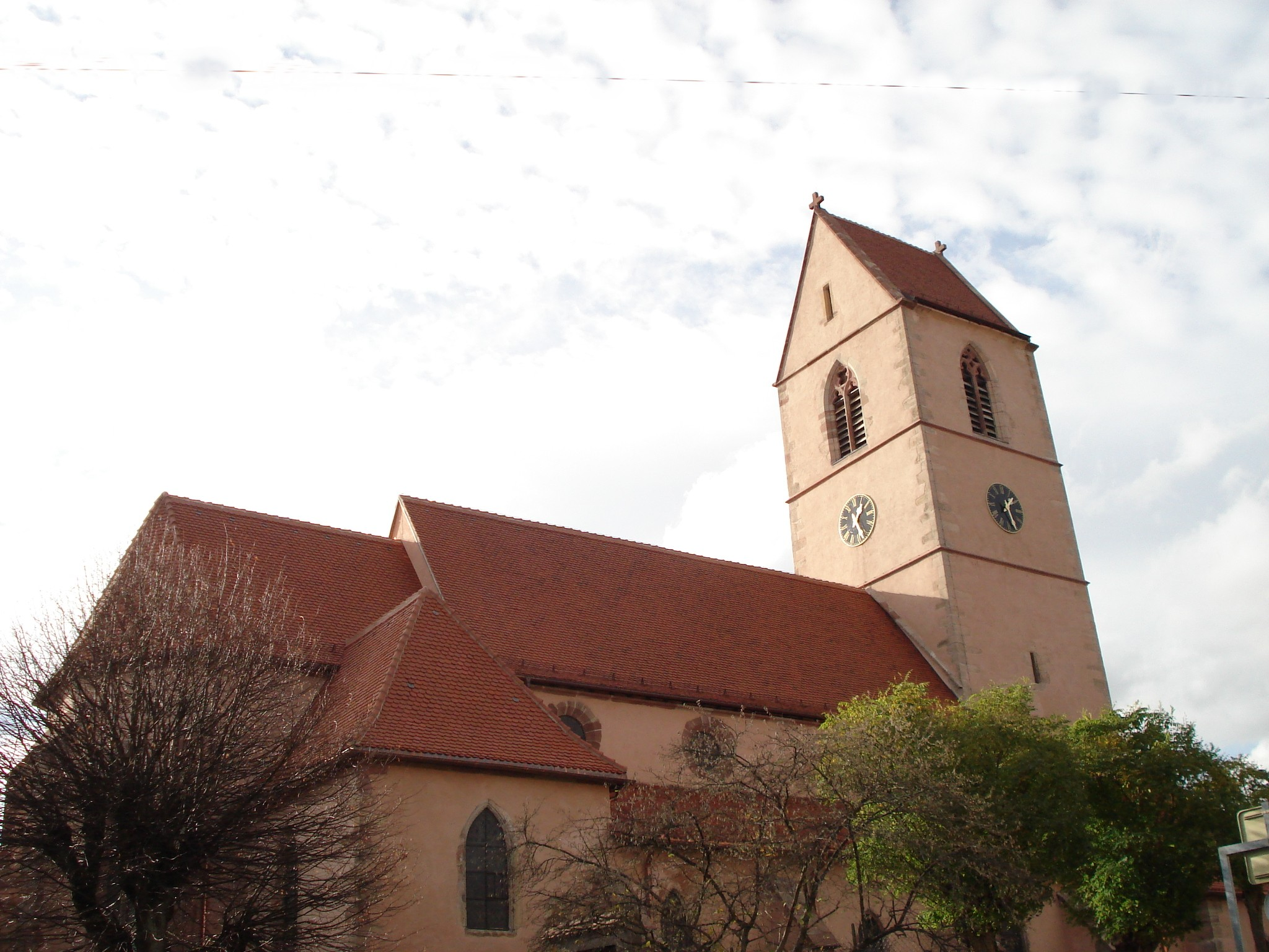 Wattwiller : Katholische Kirche mit erneuerter Bedachung (2010), Außenansicht